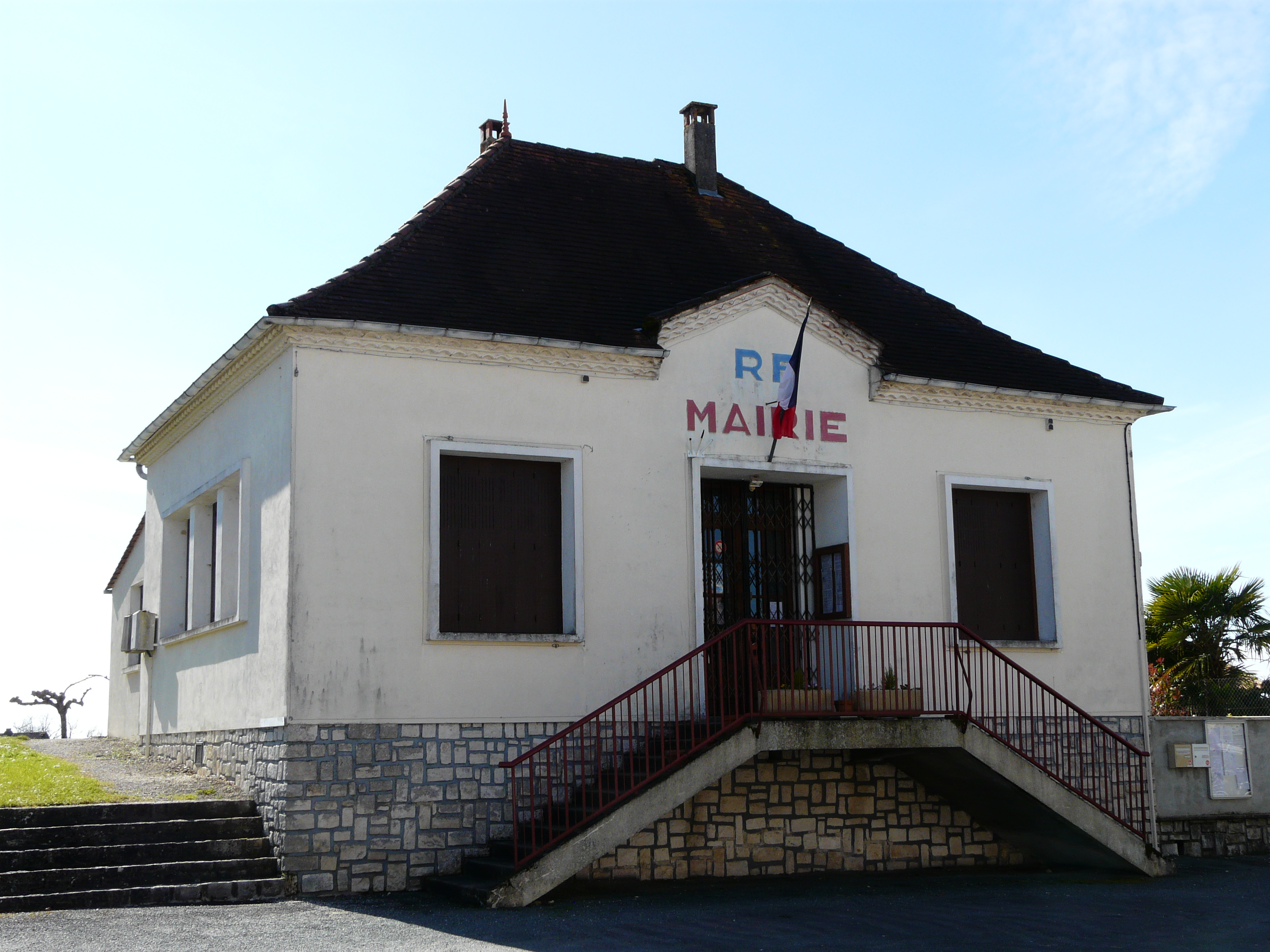 La mairie de Saint-Barthélemy-de-Bellegarde, Dordogne, France.